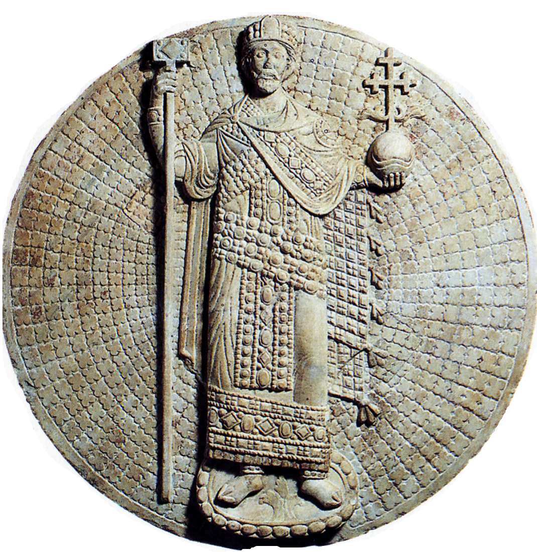 Император Иоанн II Комнин 1110-1118 Мраморный круговой рельеф, диаметр 90см. Византийская коллекция, Думбартон Оак. Вашингтон.